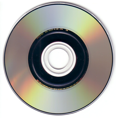 Nintendo GameCube's disk, Actual Size